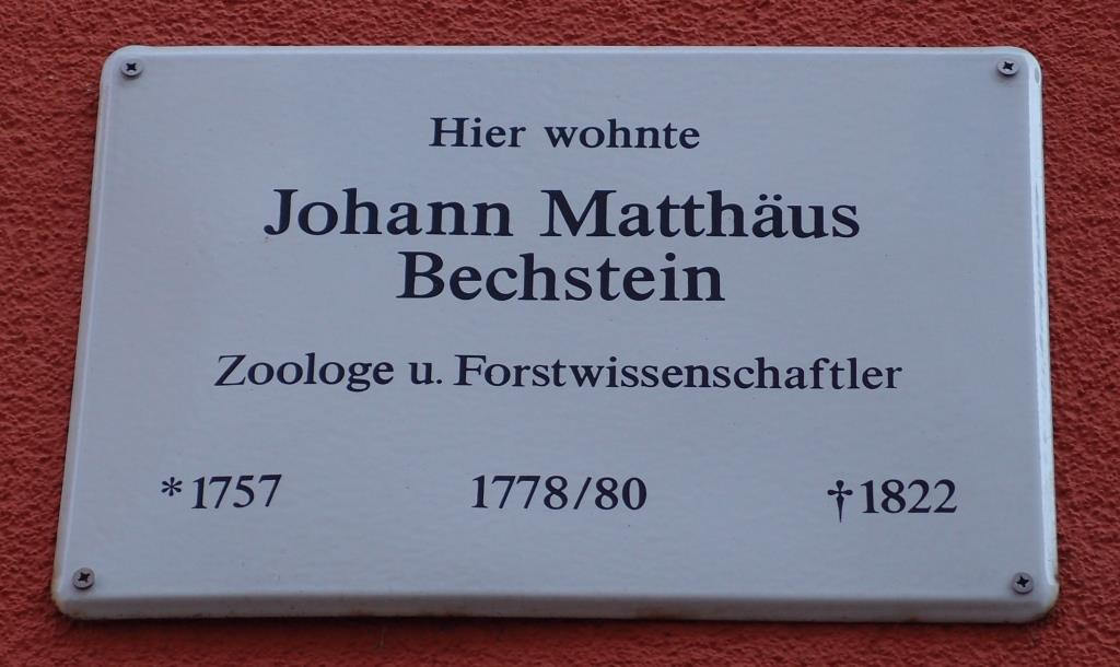 Tafel für den Naturforscher, Forstwissenschaftler und Ornithologen Johann Matthäus Bechstein (1757-1822) in Jena, Zwätzengasse 18